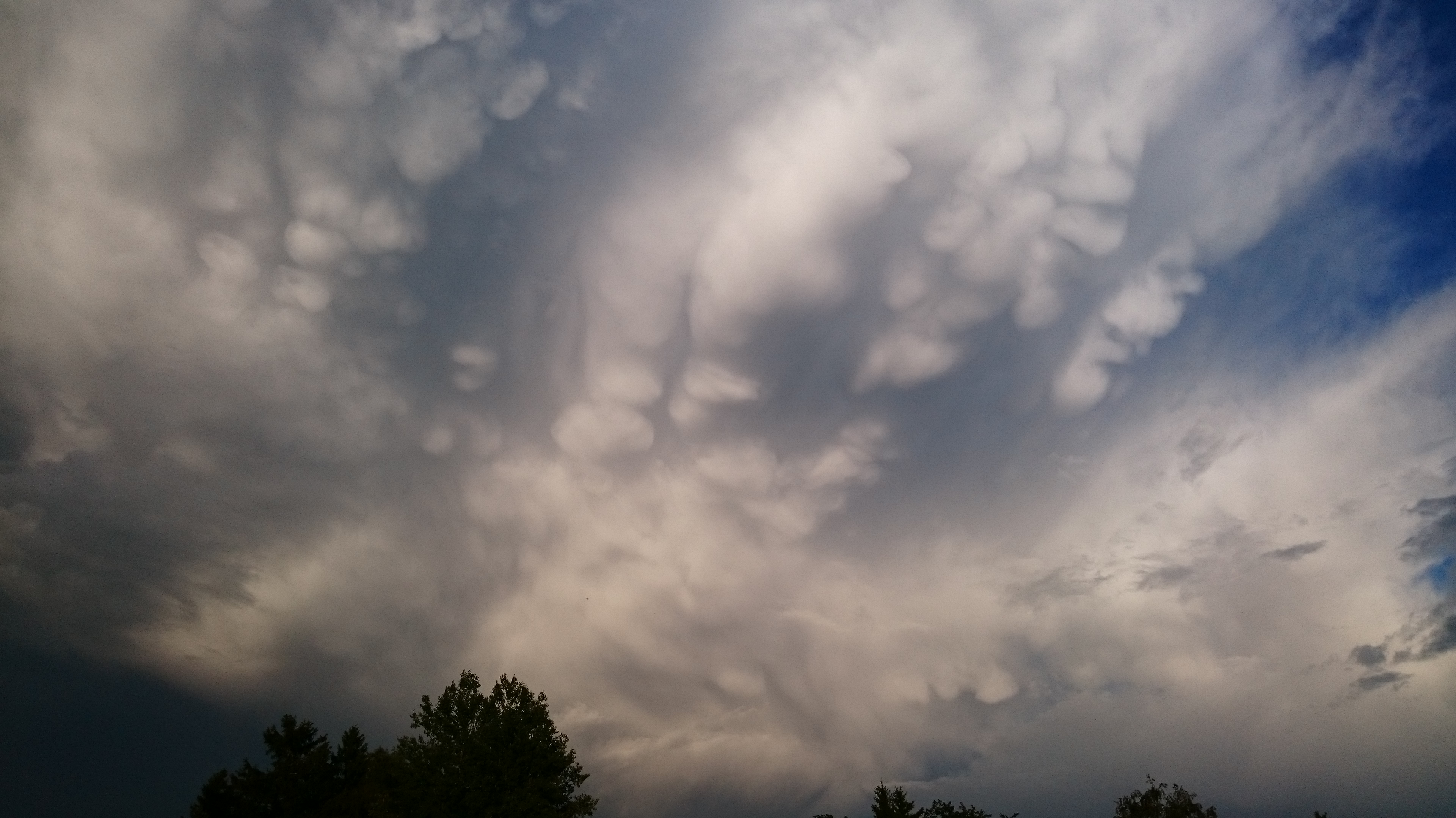 Mammatus-pilv